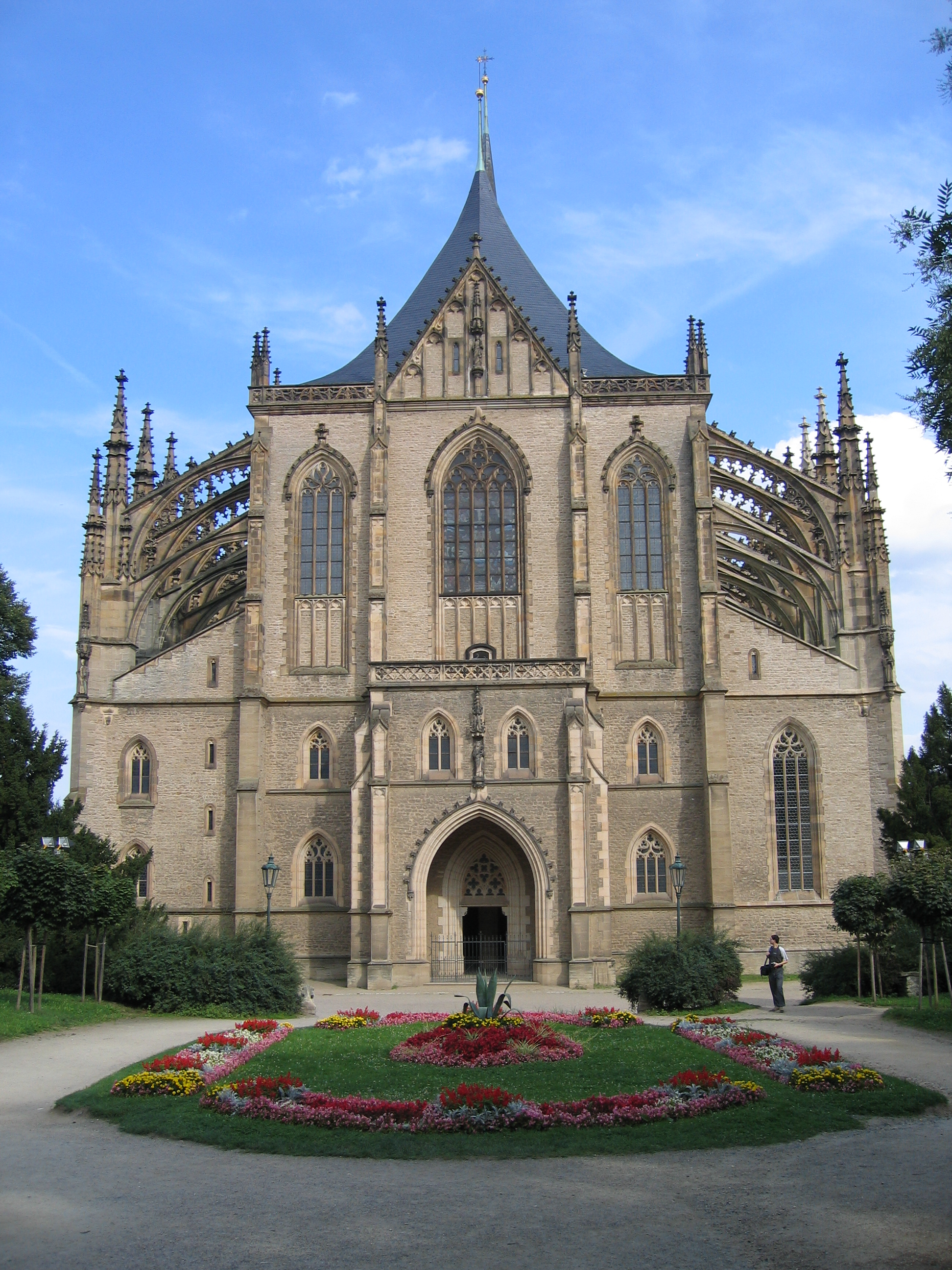 en Church of St. Barbara, Kutna Hora, Czech Republic. (2005-AUG-27) cs Chrám sv. Barbory, Kutná Hora, Česká Republika. (27. sprna 2005) ko 성 바르보라 성당 - 체코, 쿠트나 호라. (2005년 8월 27일)